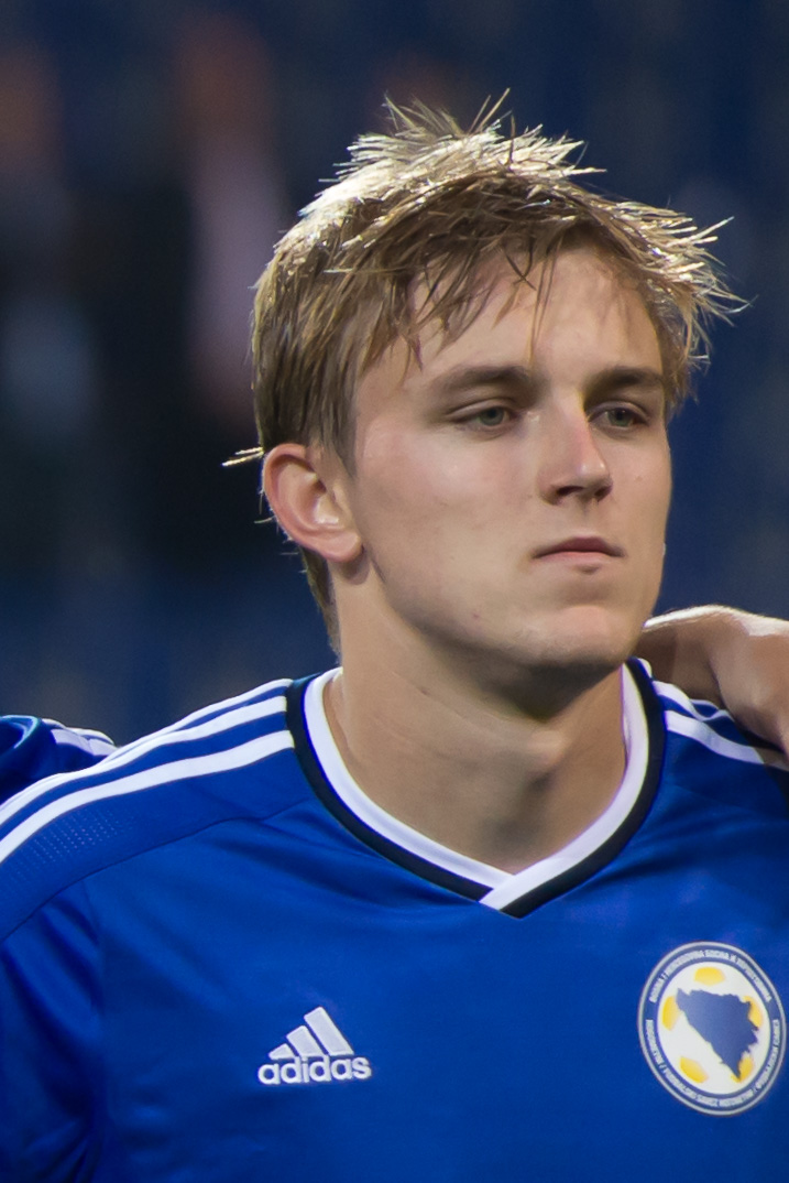 Fußball U21 EM-Qualifikation Österreich gegen Bosnien und Herzegowina St. Pölten, 5. September 2014 Nermin Zolotić